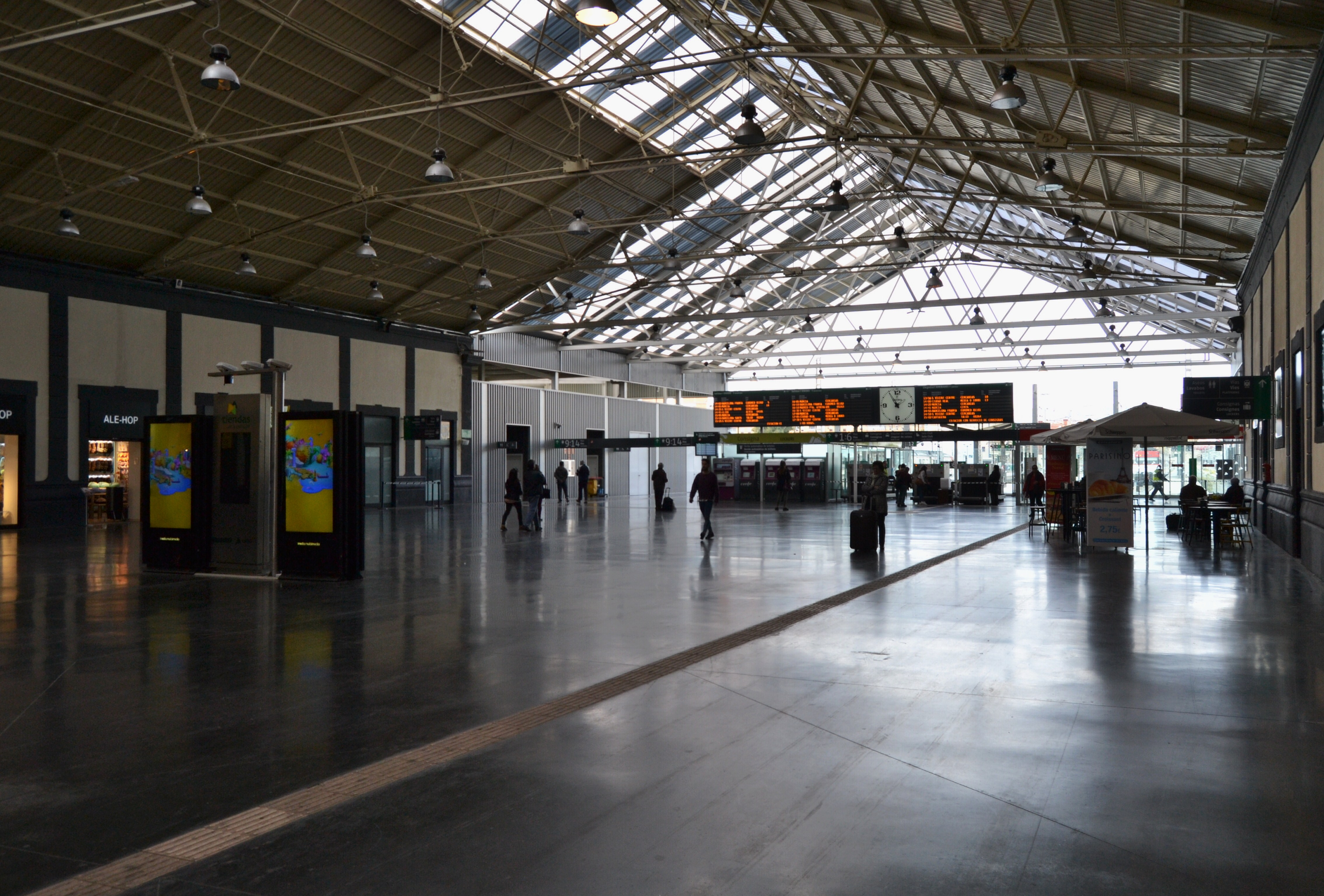 Estació d'Alacant Terminal, interior.